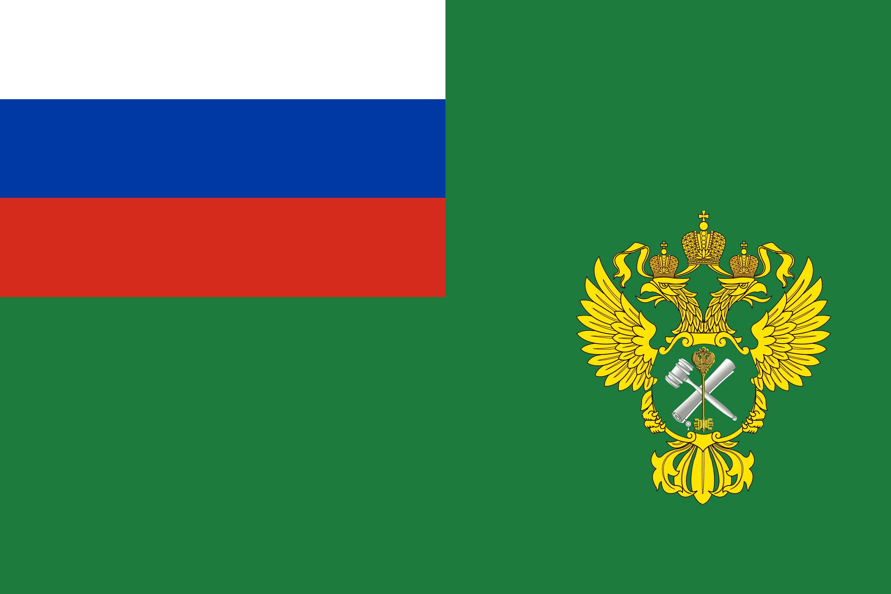 Флаг Федерального агентства по управлению государственным имуществом